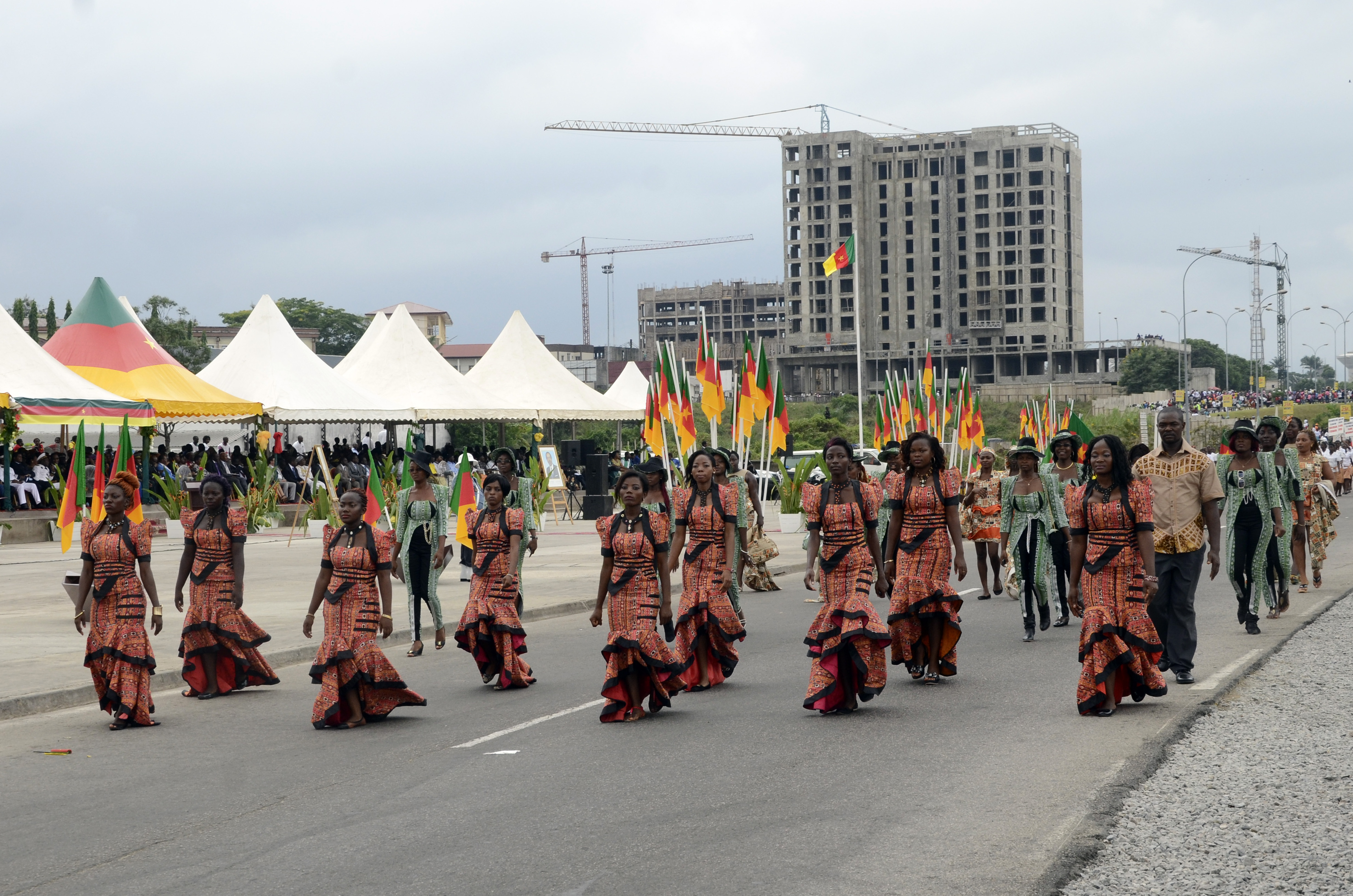 Défilé journée internationale de la femme This is an image of Cultural Fashion or Adornment from Cameroon